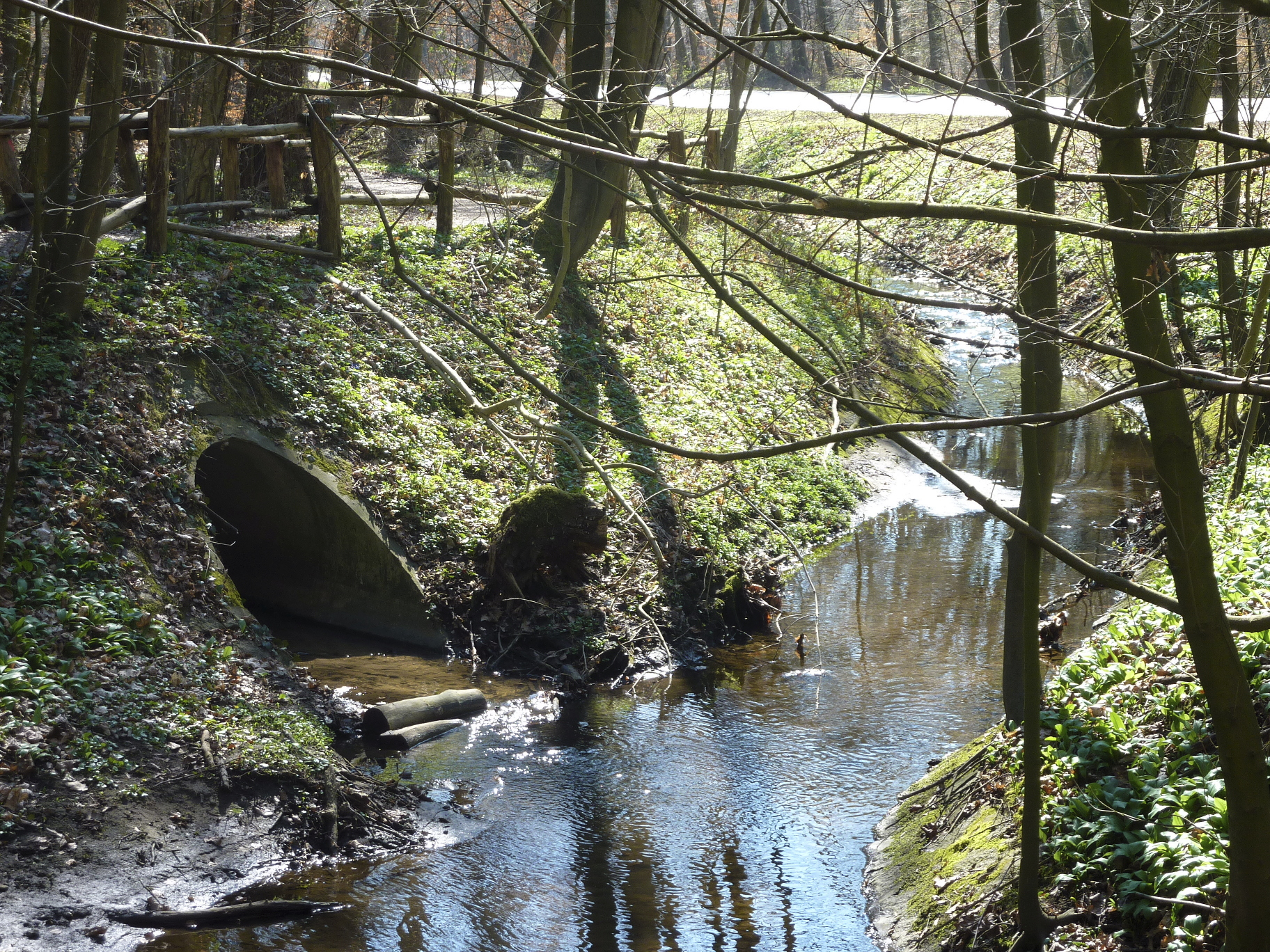 Der Königsbach, im Volksmund auch Luderbach genannt, ist ein 13,7 km langer linker (südlicher) Zufluss des Flusses Main im deutschen Bundesland Hessen. Der Bach entspringt östlich der Stadt Dreieich im Landkreis Offenbach, durchfließt das Stadtgebiet von Neu-Isenburg sowie den Frankfurter Stadtwald und den dort befindlichen Jacobiweiher. Er mündet verrohrt im Stadtteil Niederrad der Stadt Frankfurt am Main. Das Foto zeigt einen Abschnitt des begradigten Bachlaufs im Frankfurter Stadtwald mit der Mündung des Bachs vom Mörderbrunnen (links). Im Hintergrund die Darmstädter Landstraße. Blick nach Südwesten